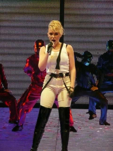 KylieX2008